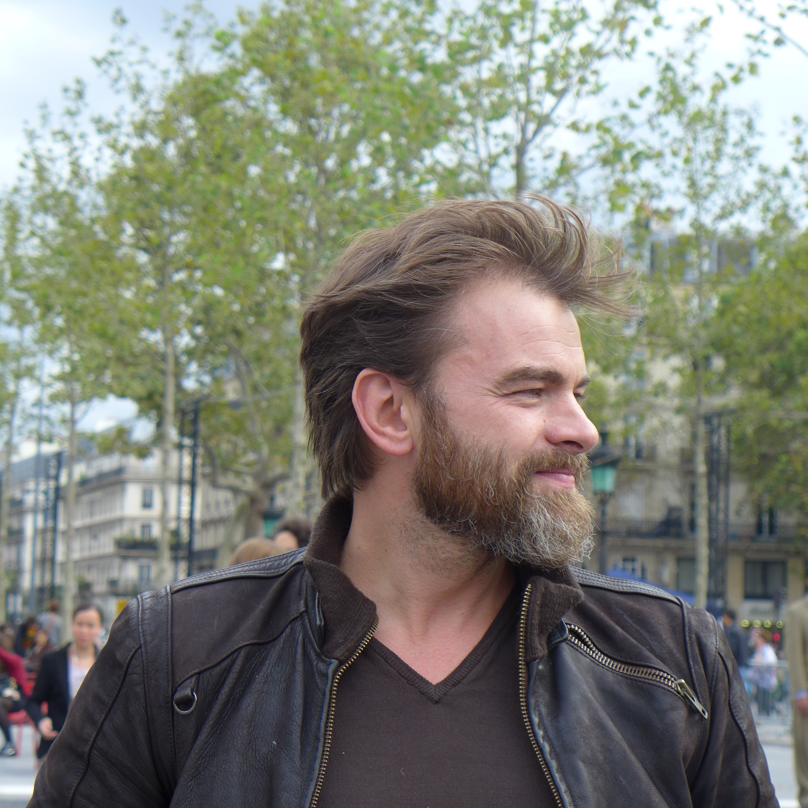 Clovis Cornillac Place de la République, paris, le 5 octobre 2013, en soutien aux militants de Greenpeace emprisonnés en Russie